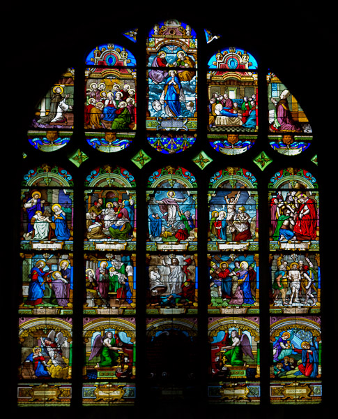 Vitrail de l'aile Est de l'église d'Alménèches (Abbatiale)